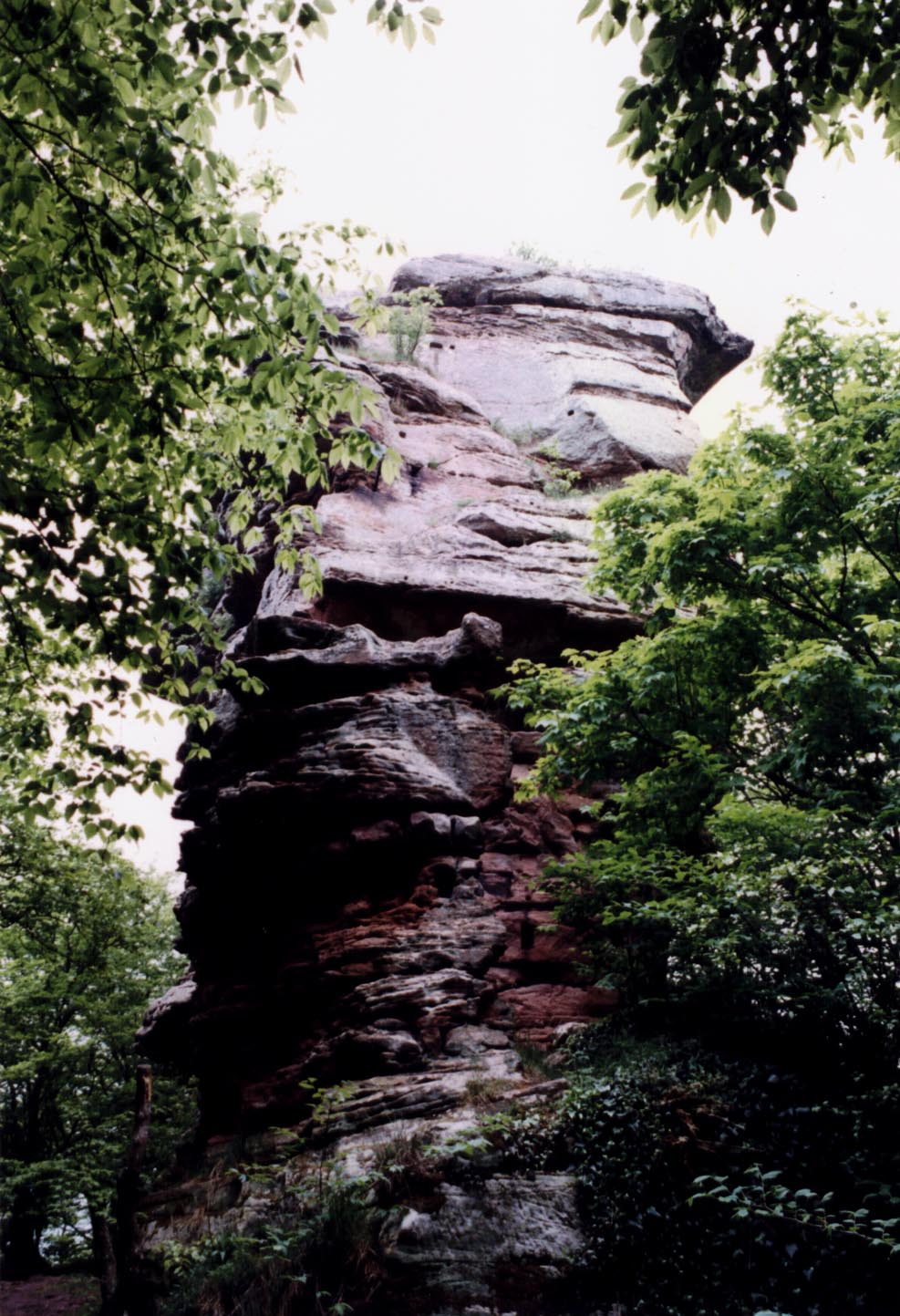 Burg Anebos. Burgfelsen, selbst fotografiert, MacElch (Rainer Kunze), 2000 .